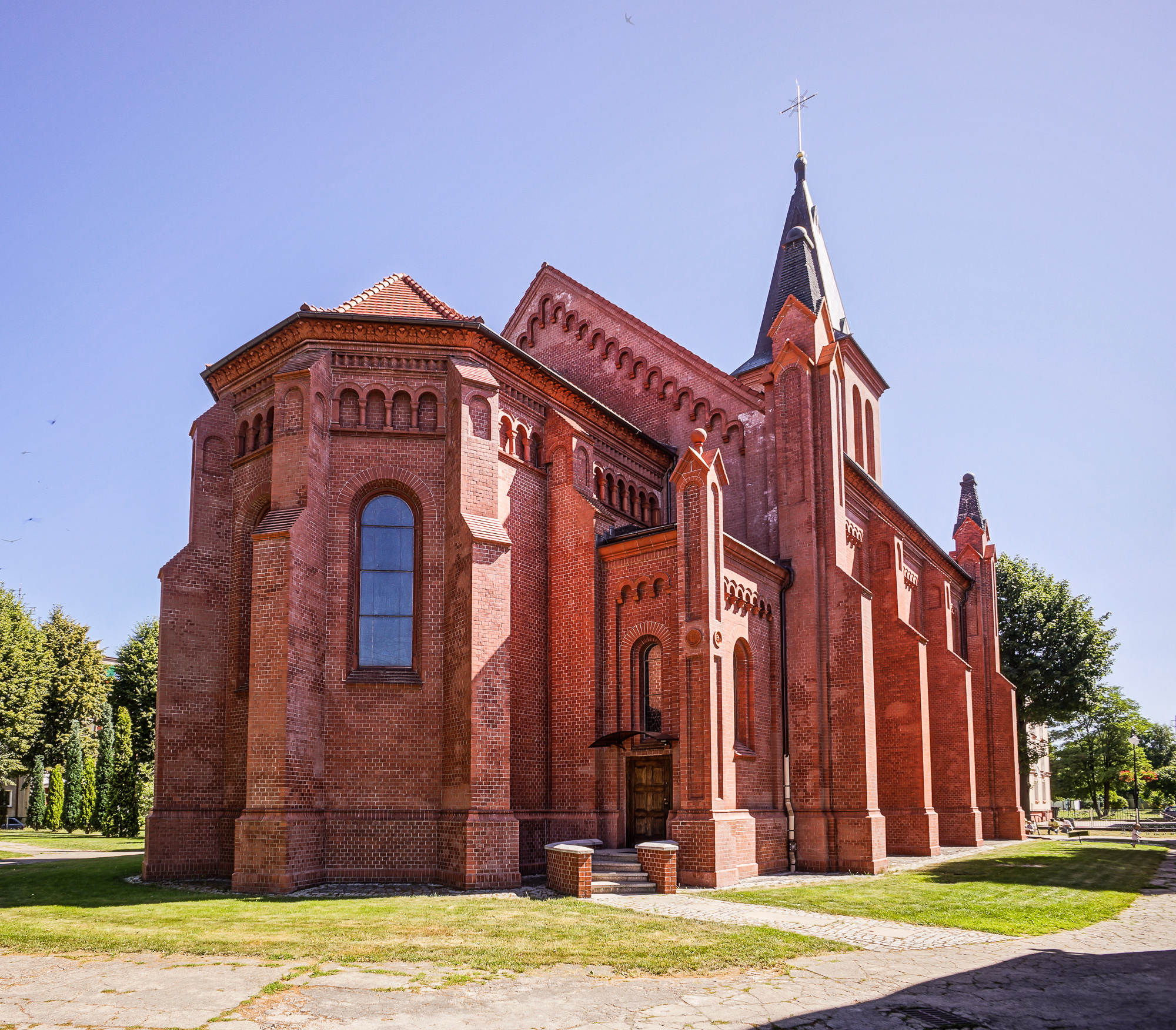 Pieńsk, kościół par. p.w. św. Franciszka z Asyżu, 1822-85, nr rej.: 5/A/00 z 10.03.2000.